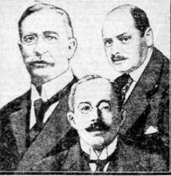 DE NED. DELEGATIE TER Ontwapening CONFERENTIE TE WASHINGTON. Dinsdag dezer zal de Nederlandse delegatie per s.s. „Rotterdam" naar de Ver. Stalen vertrekken om daar deel te nemen aan de ontwapeningsconferentie. Boven links Dr. E. Moresco. rechts Jhe. Mr. F. Beelaerts van Blokland En in het midden Jhr. Mr. Dr. H. A. van Karnebeek.